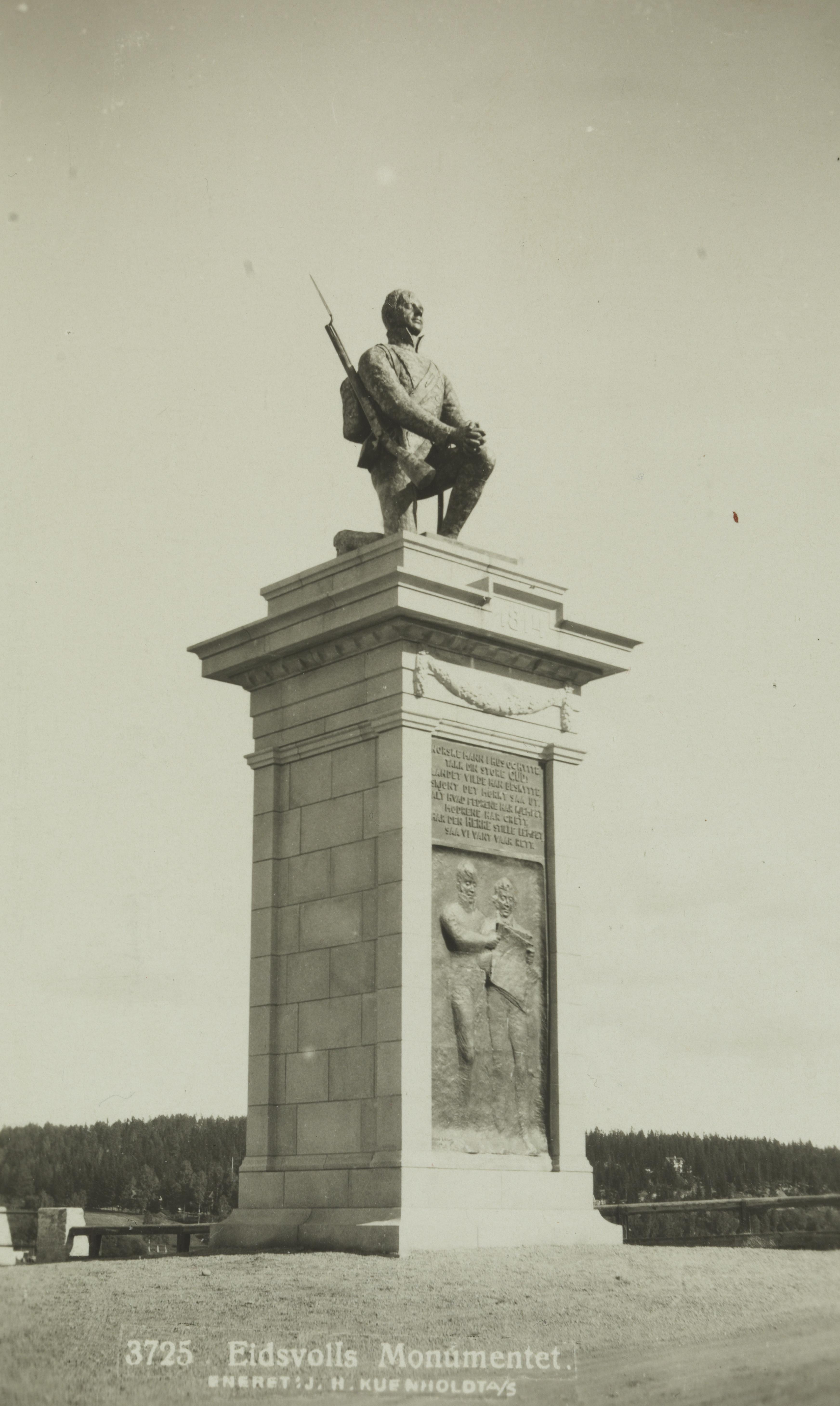 Bildet er hentet fra Nasjonalbibliotekets bildesamling Eidsvoll,Sundbrua, Eidsvoll, Akershus